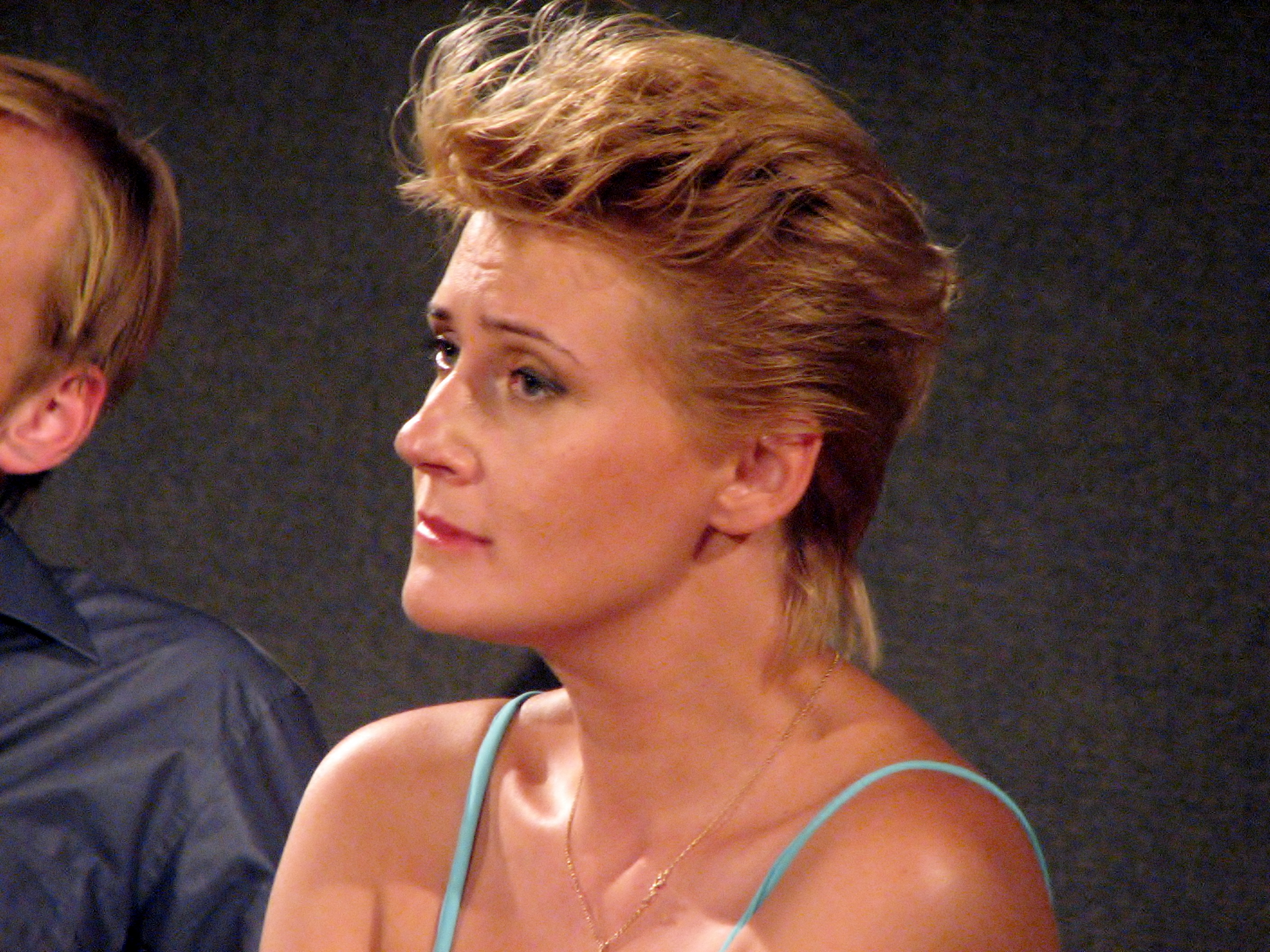 Natalja Murina Tallinna Kirjanike Maja laval festivali III Dovlatovi Päevad Tallinnas raames